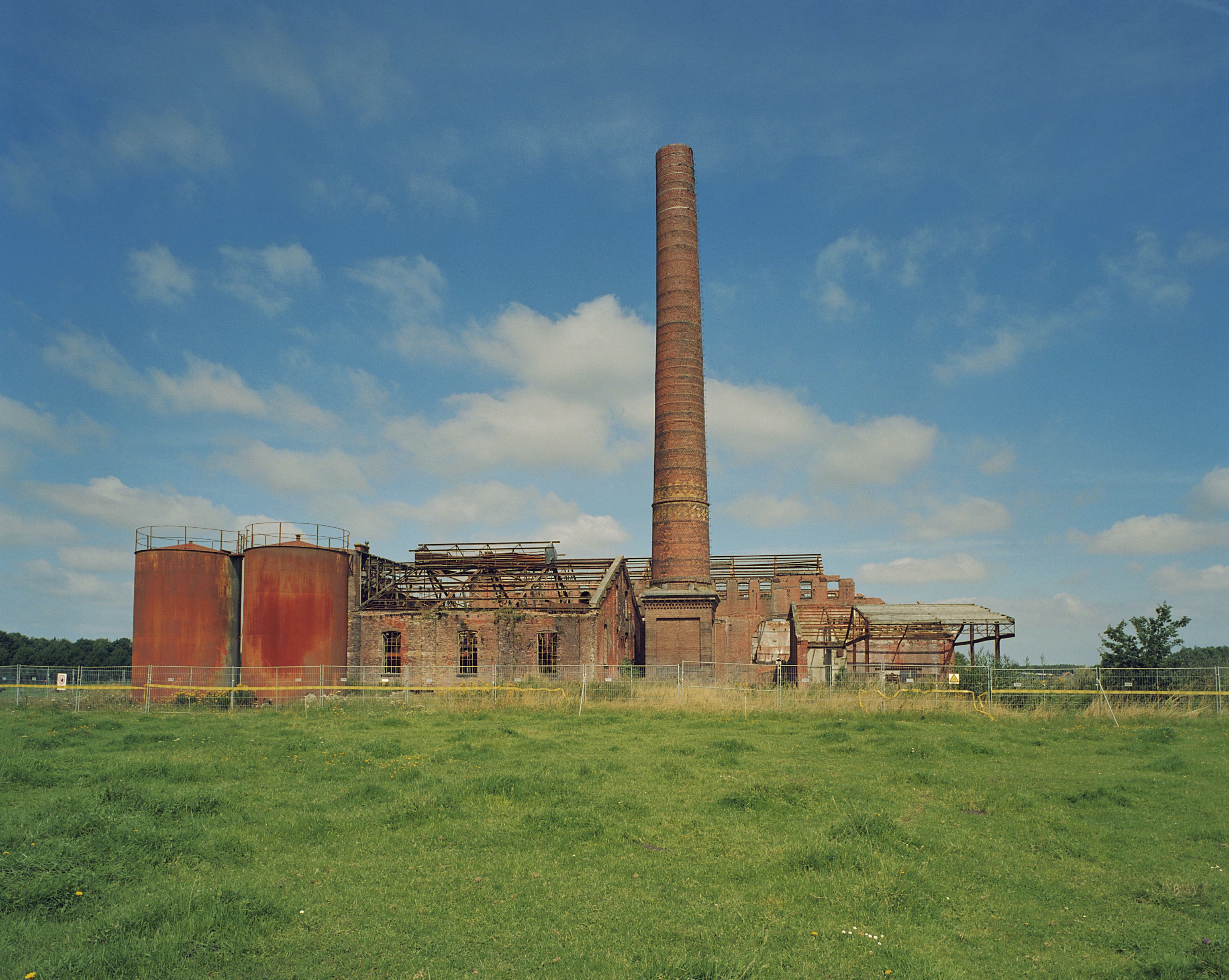 Strokartonfabriek De Toekomst: Overzicht overblijfselen van de fabriek met de schoorsteen, zuidoost zijde